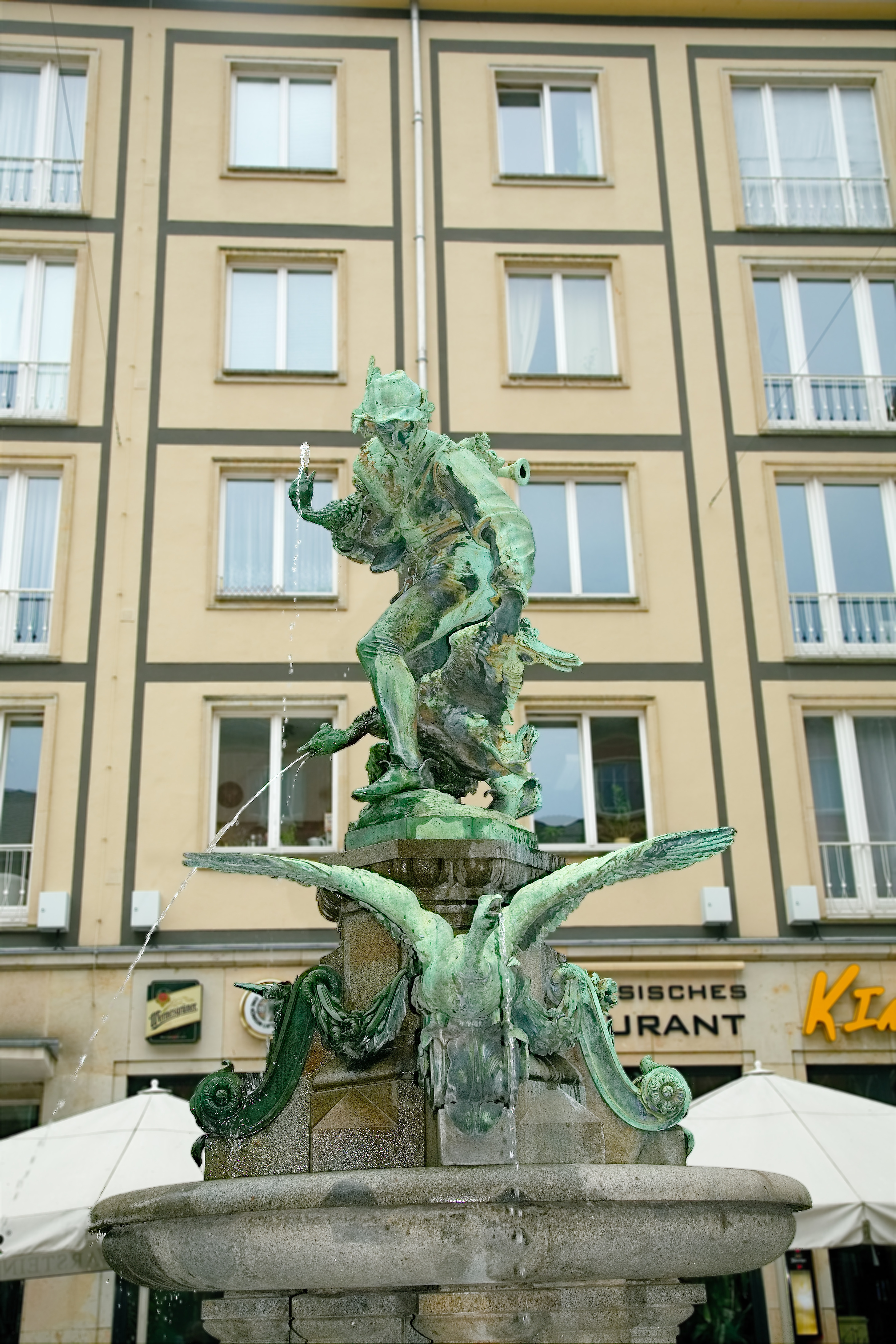 Gänsediebbrunnen